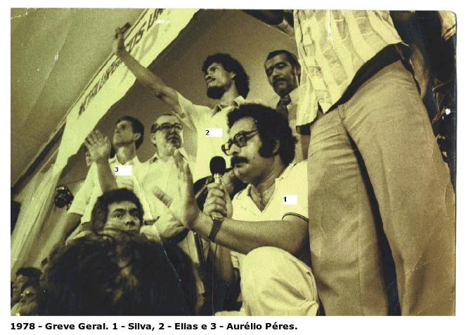 Cleodon Silva junto a Aurelio Peres e Elias na Greve Geral de 1978